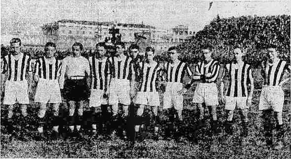 Una formazione della Juventus nella stagione 1929-1930. Da sinistra: L. Mosca, U. Caligaris, G. Combi, V. Rosetta, T. Caudera, R. Sanero, R. Orsi, G. Zanni, F. Munerati, J. Viola, M. Varglien.